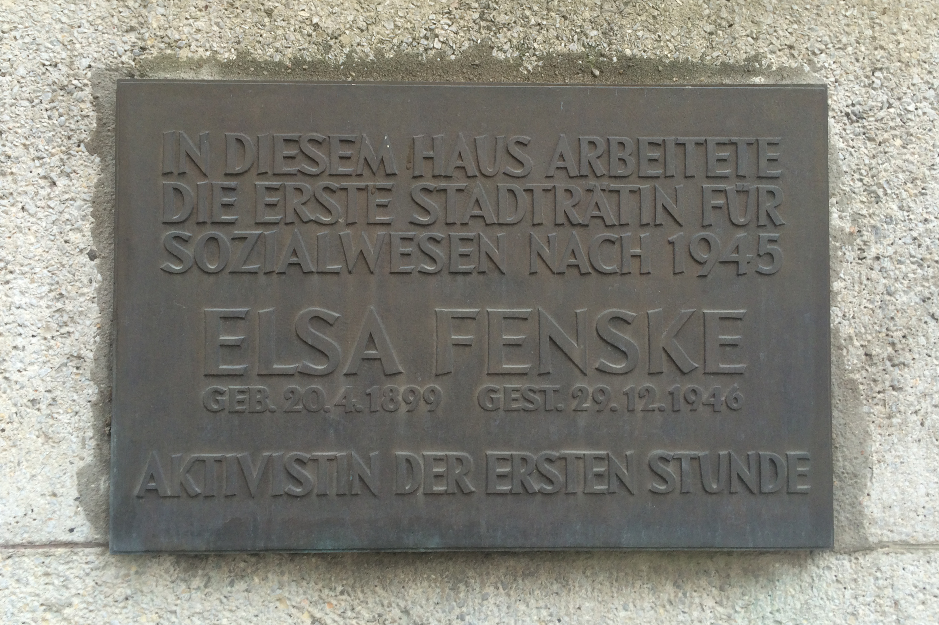 Plakette für Elsa Fenske aus dem Jahr 1956 am Stadthaus Dresden